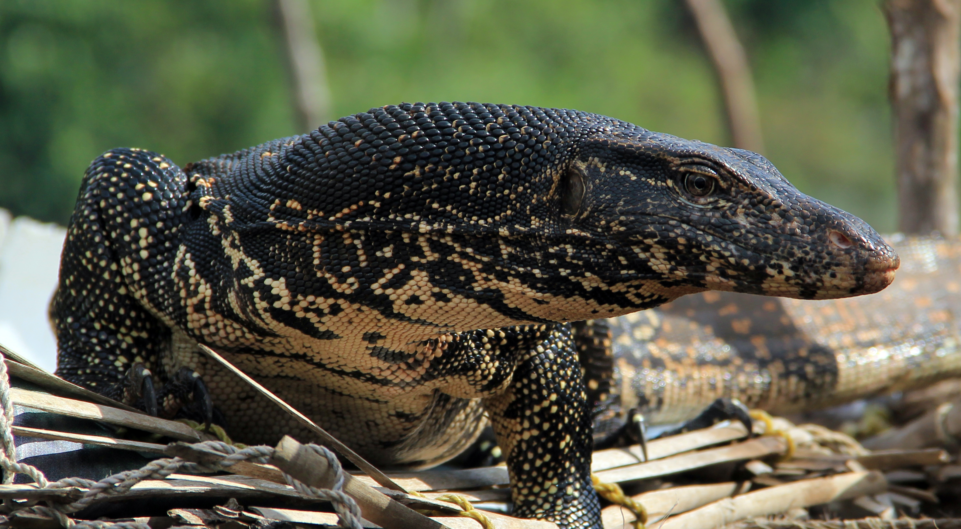 Water Monitor, Bentota #2